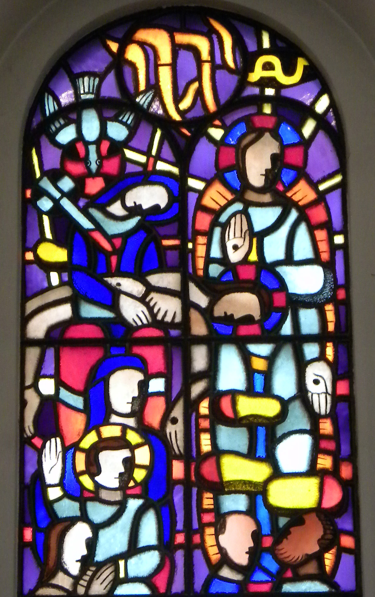 Glasmålning med tetragrammet JHWH i en övre rund medaljong i Husie kyrka, Malmö